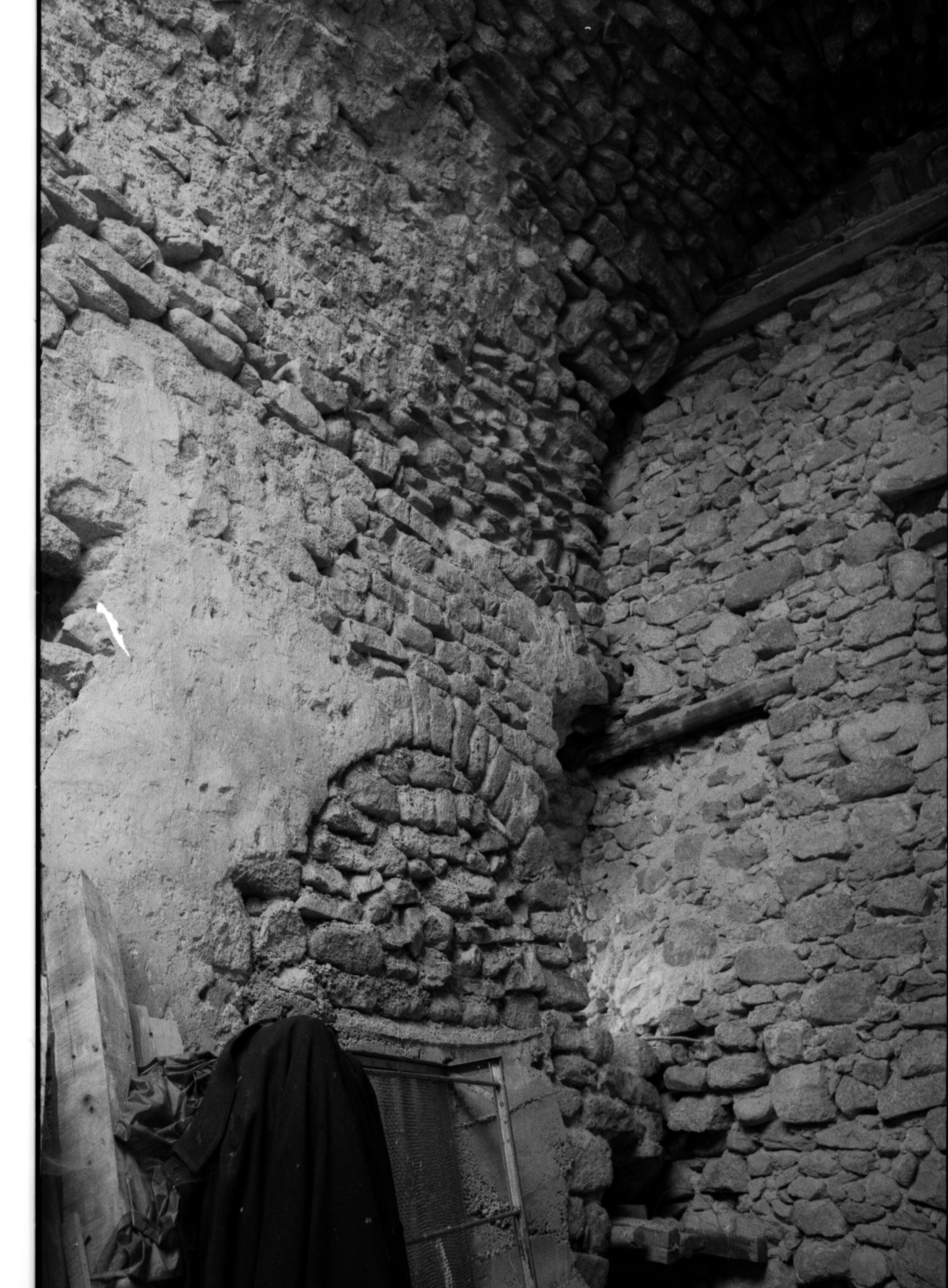 Mas Corbós (Fenolleda-Occitània). Restes de la possible capella de la sotscomanda templera. 1989.